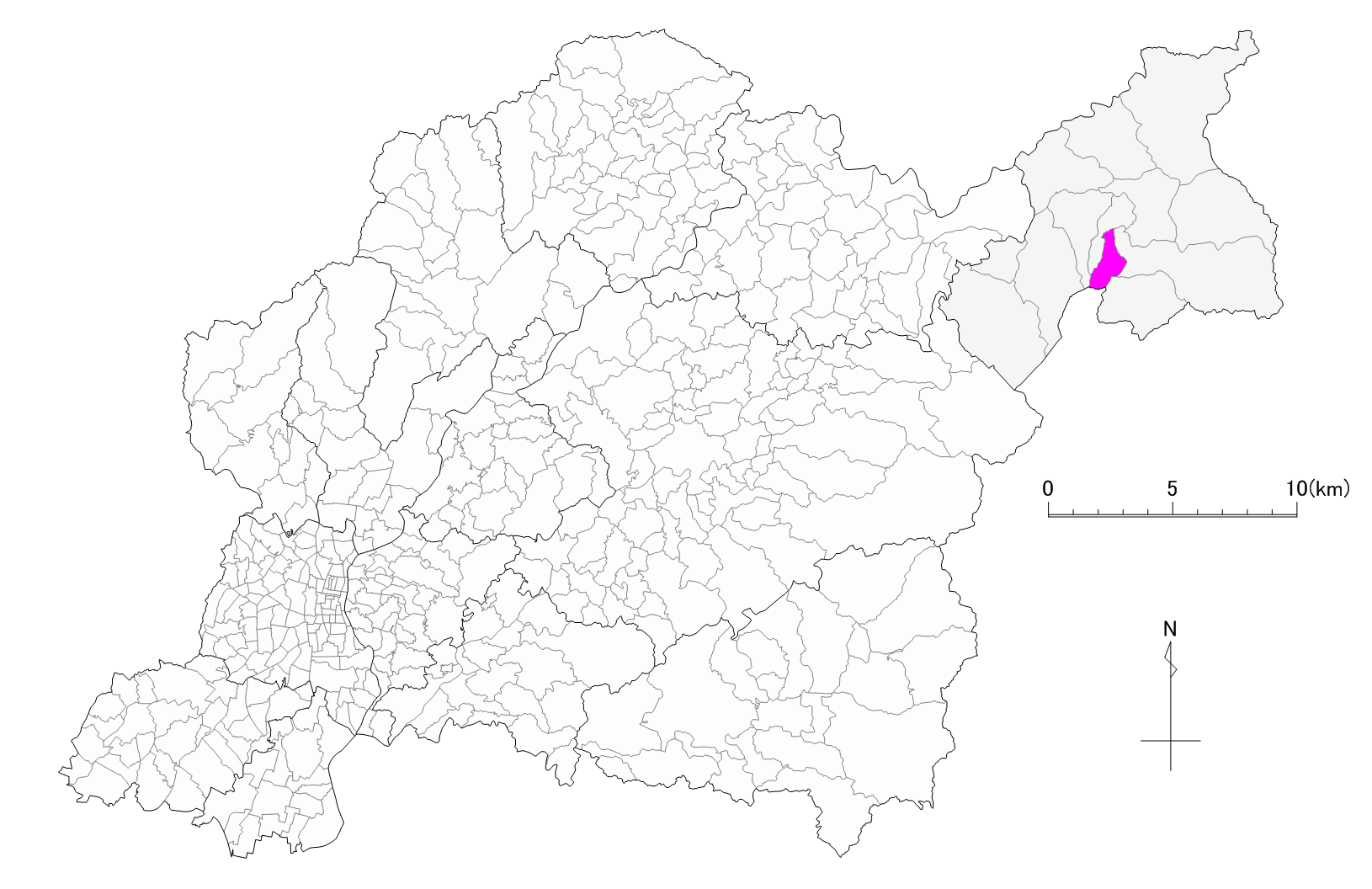 豊田市武節町位置図